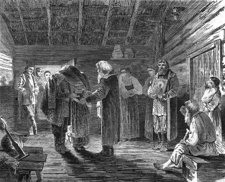 Крестьянская помолвка. Гравюра А. Зубчанинова по рисунку Н.И. Соколова